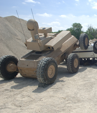 FCS MULE ARV